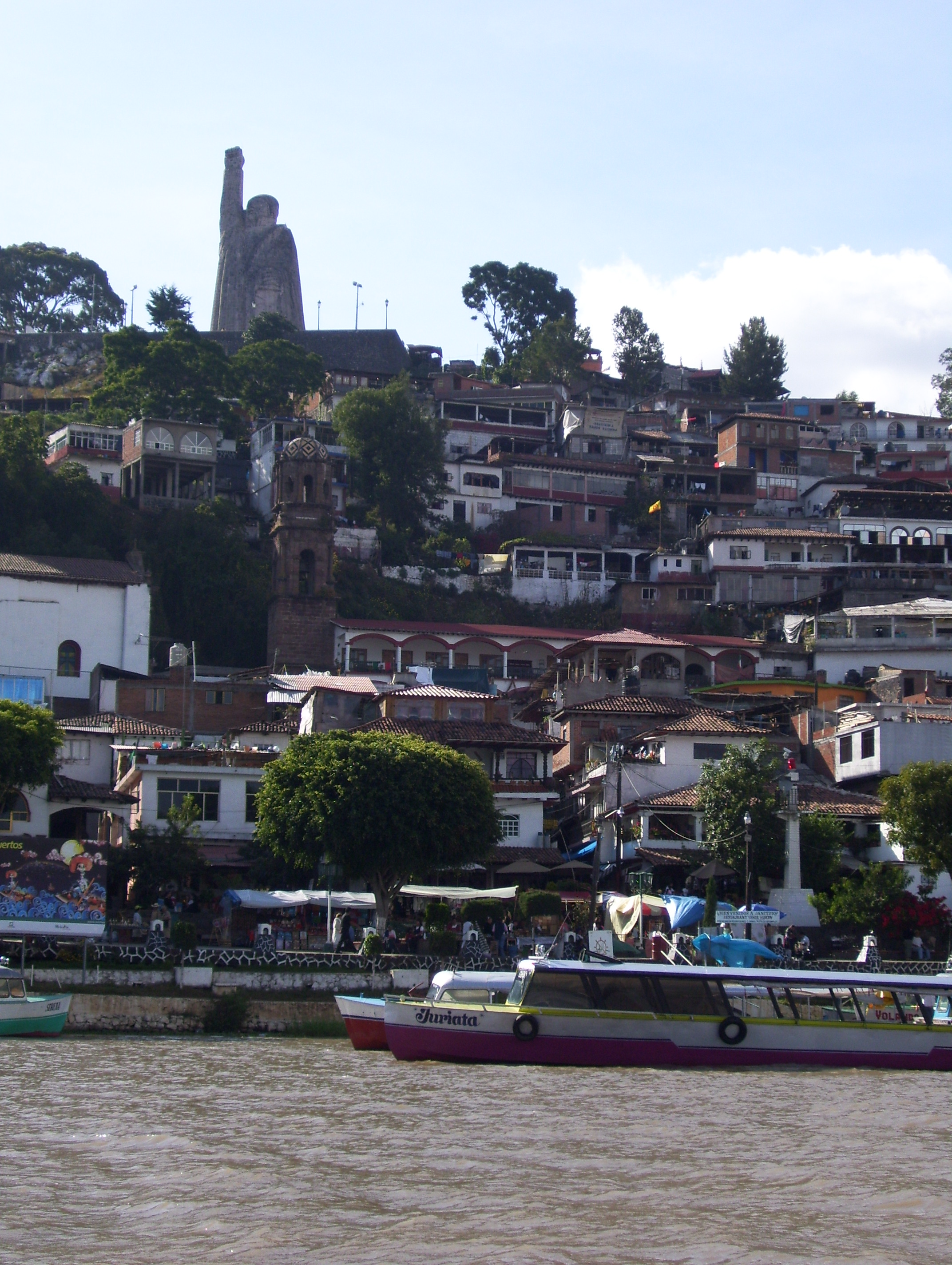 Isla de Janitzio en el Lago de Pátzcuaro, Michoacan